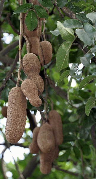 Sausage Tree Kigelia africana in Kolkata, West Bengal, India.